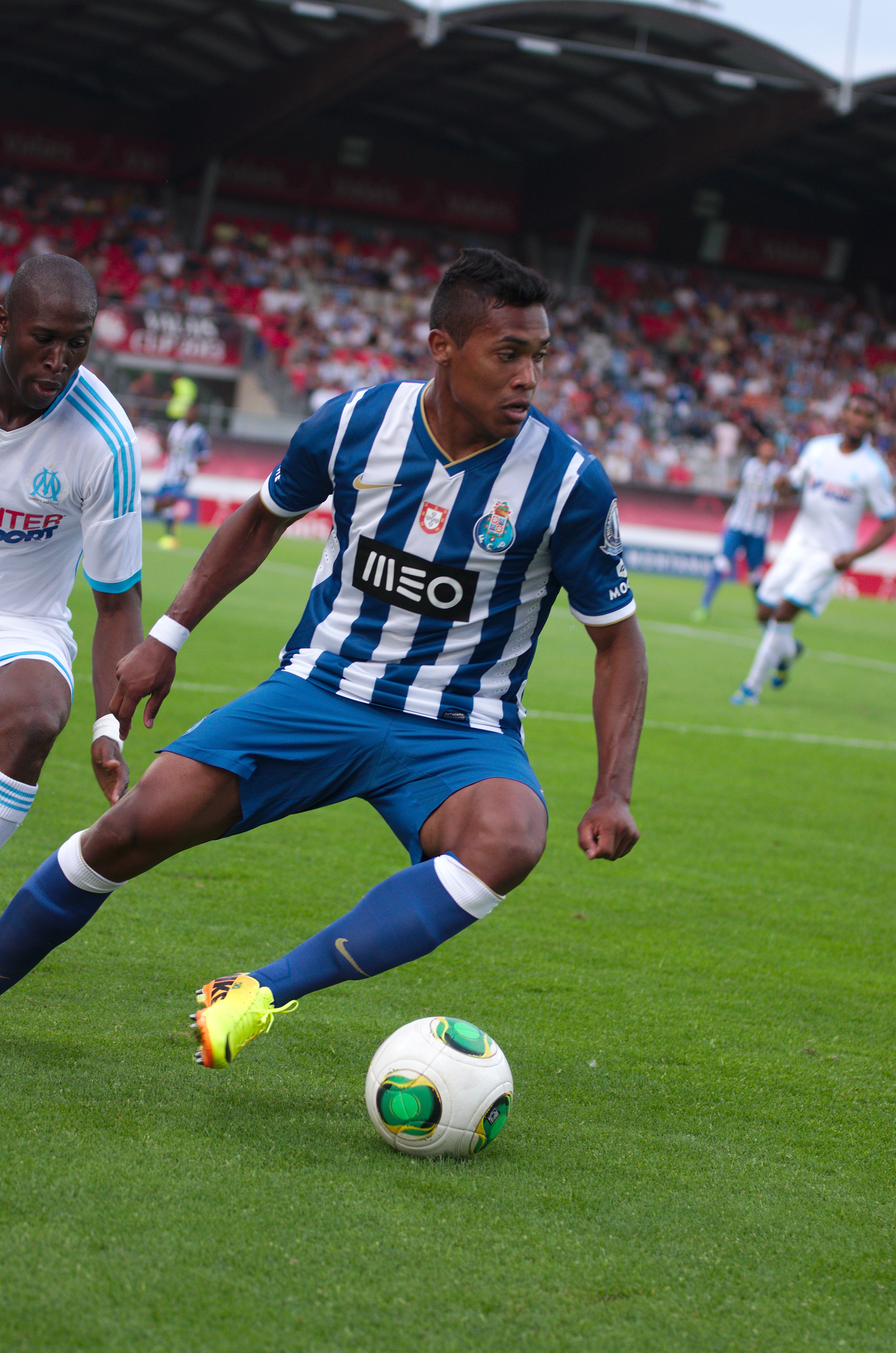 Valais Cup 2013 - OM-FC Porto - 20130713 - Alex Sandro